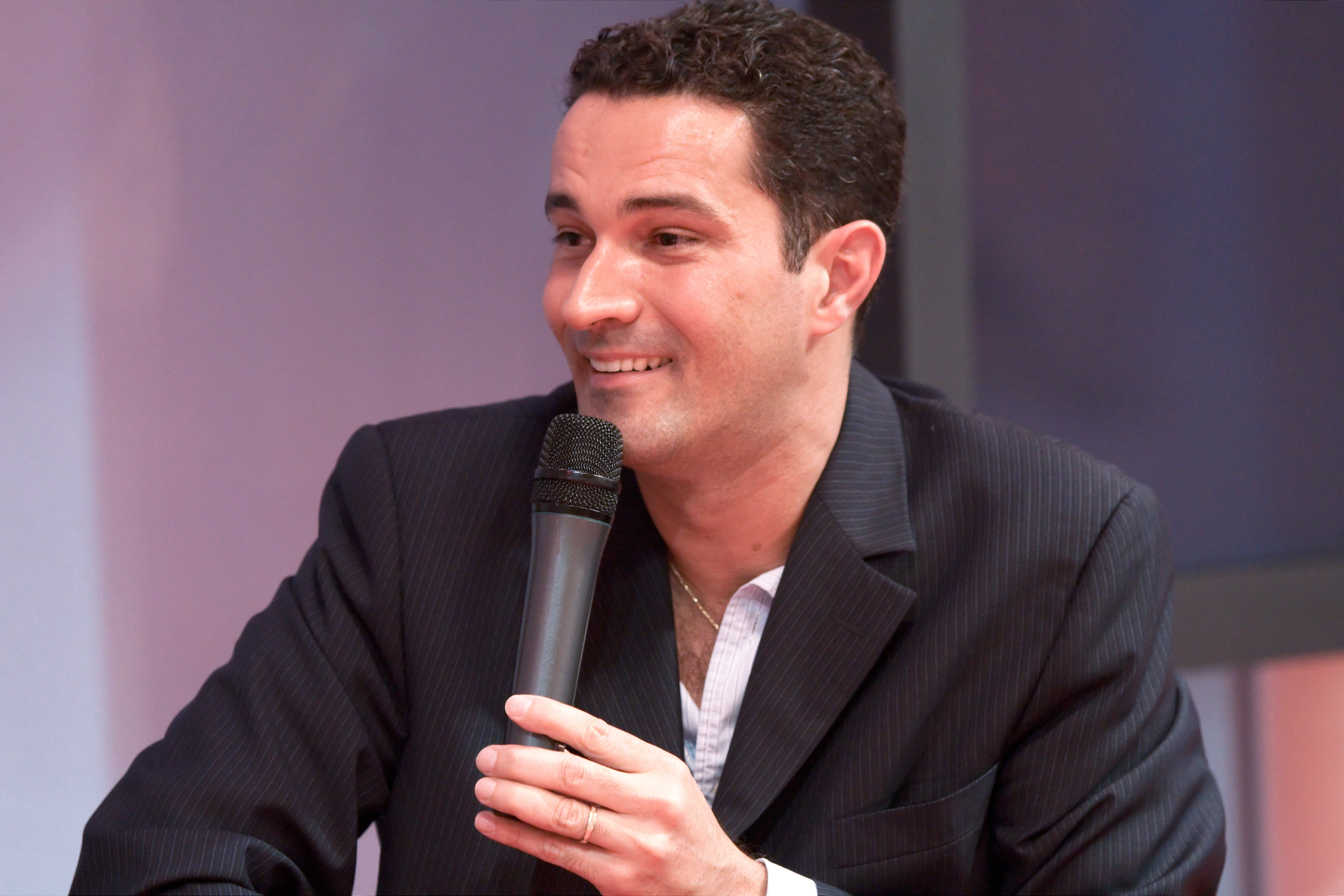 Stéphane Bijoux, présentateur de Soir 3, au Salon du livre de Paris lors du débat Les émissions culturelles et littéraires : l'audimat, une ambition pas une obsession !